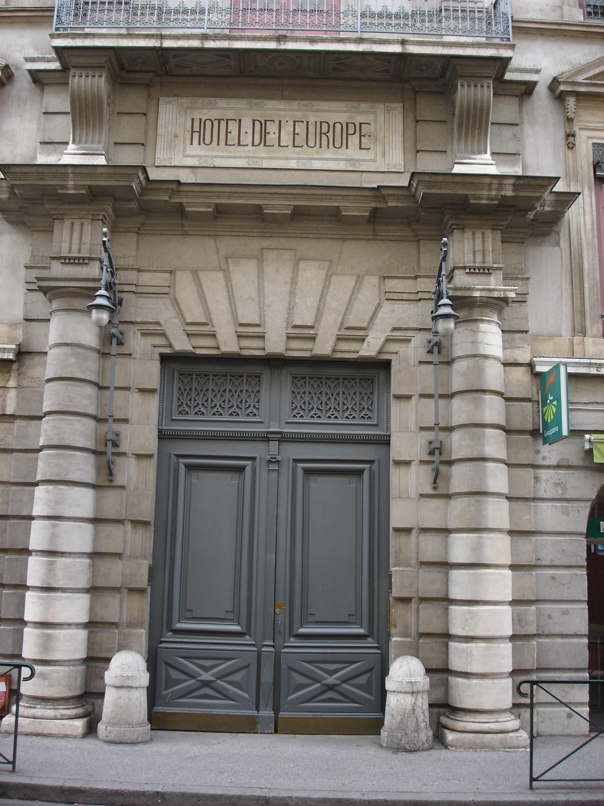 Porte de l'Hôtel de l'Europe dans le 2ème arrondissement à Lyon en France.